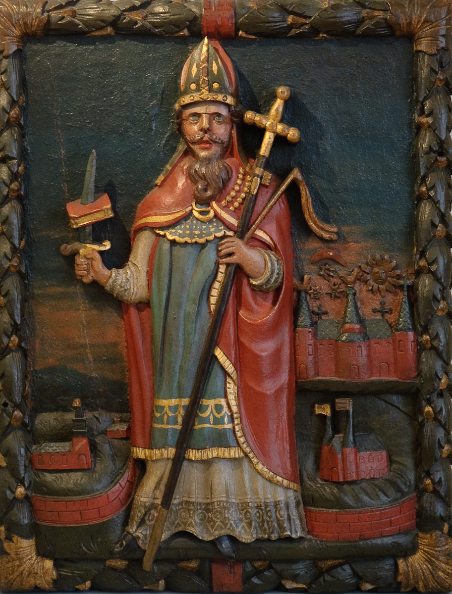 Houten reliëf met afbeelding van Bonifatius (70×50x10 cm), 18e eeuws houten reliëf met Bonifatius, met kruis en zijn attribuut (doorstoken evangelieboek) en drie steden: Dokkum (linksonder), Fulda en Utrecht (?), 70x50x10cm, 18e eeuw